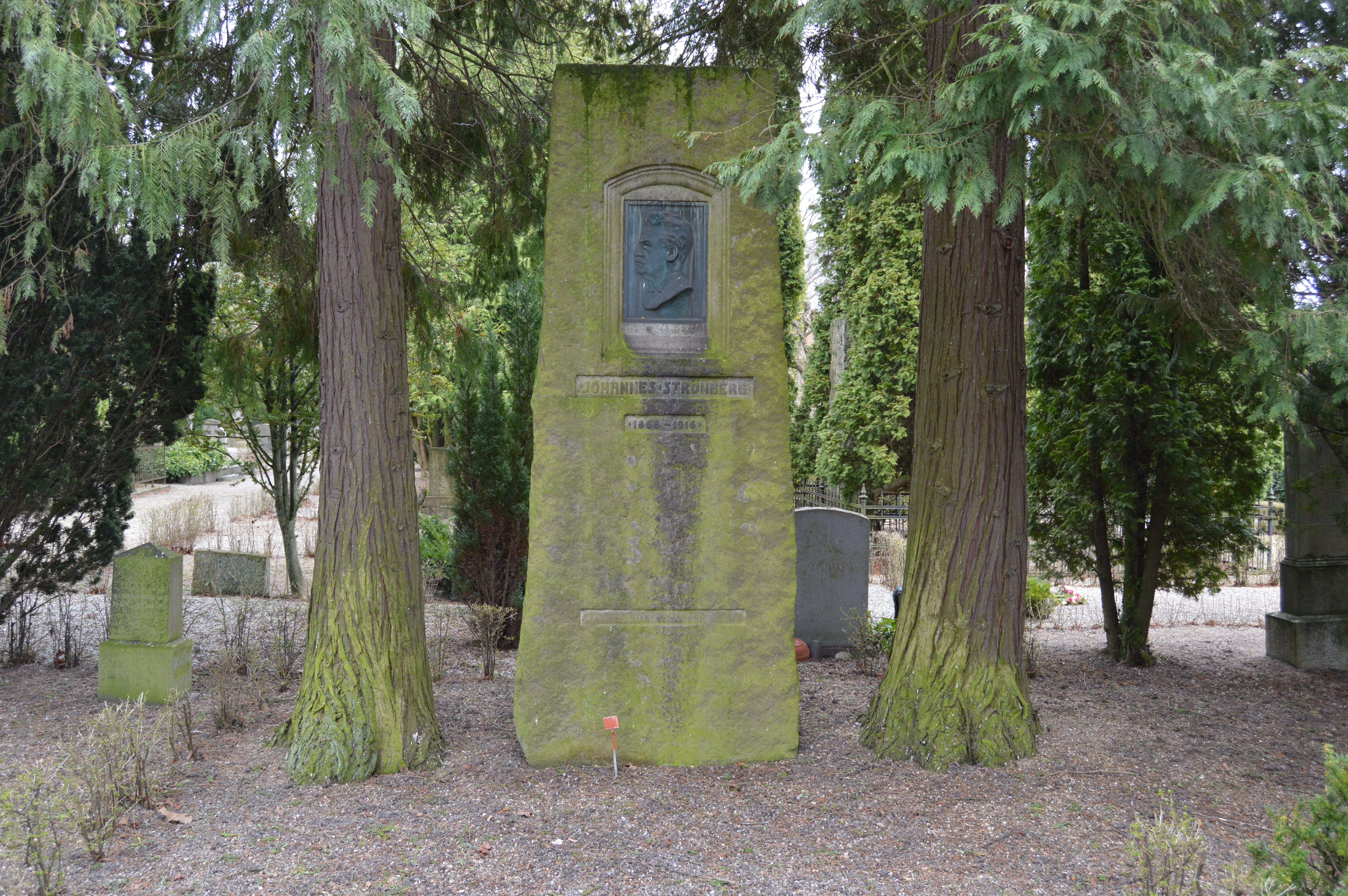 Johannes Strömbergs grav på Östra kyrkogården i Lund.